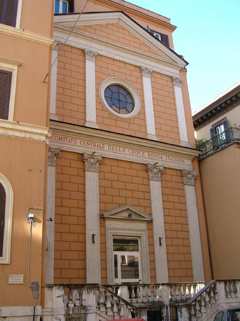 Chiesa sconsacrata di San Giuseppe Calasanzio a Roma, nel rione Ludovisi.